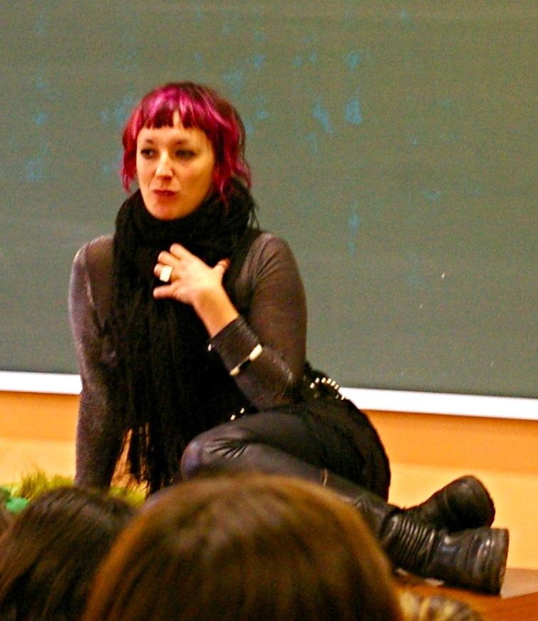 Itziar Ziga es una activista feminista y periodista.